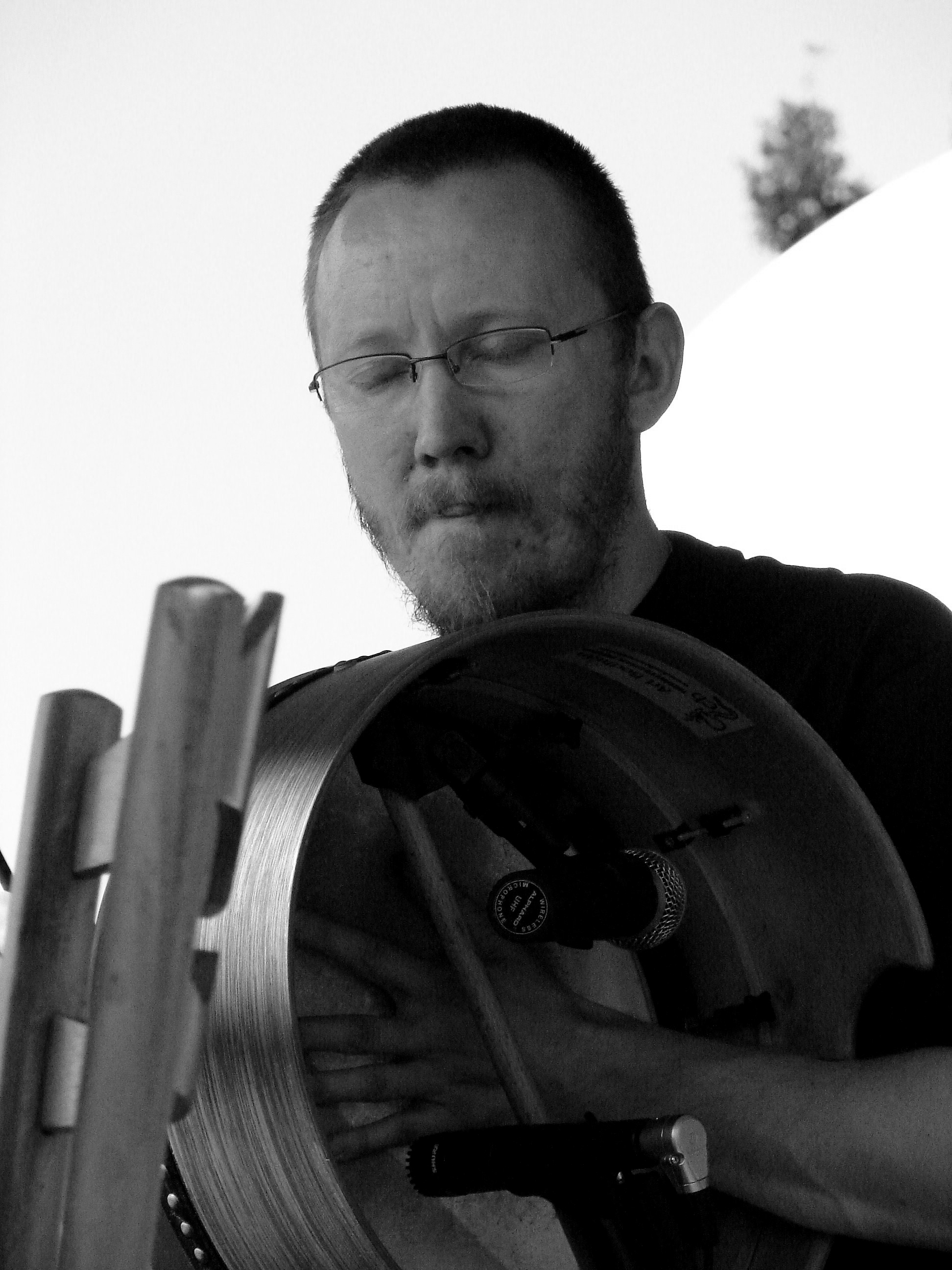 Marek Kwadrans podczas koncertu zespołu Shannon w Pyskowicach (Dybuk - Festiwal na kultur rozstajach)